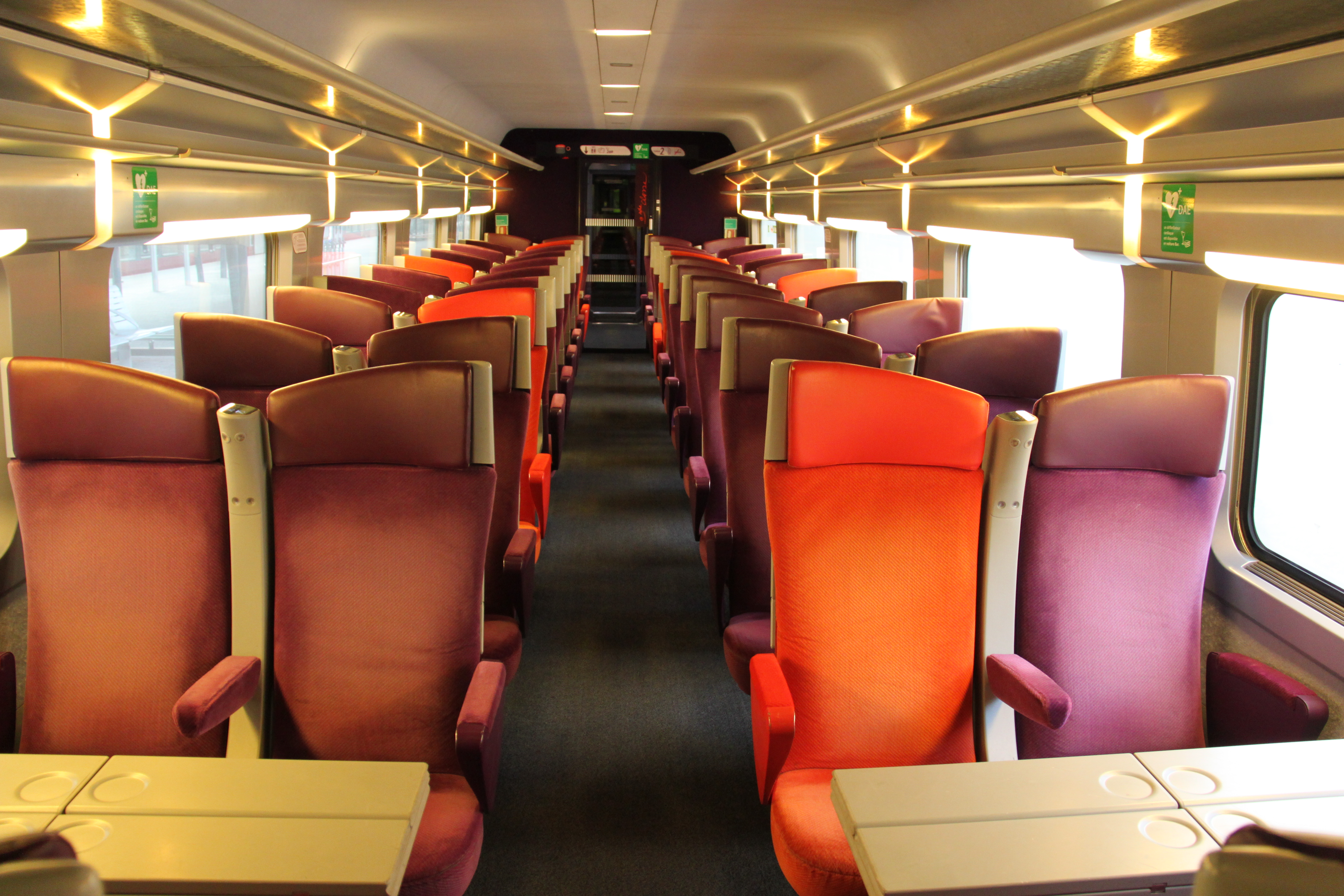 Interieur TGV Reseau tweede klasse